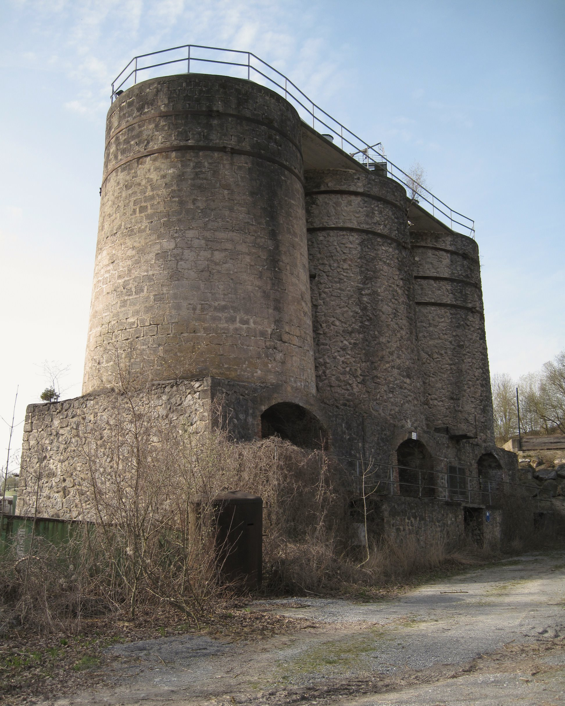 Als Industriedenkmal unter Schutz stehende „Kalköfen Horst“ in Balve-Eisborn. 1962 stillgelegt. Erbaut 1929/1930; Zweiergruppe (Bruchsteinmauerwerk) 1929, dritter Ofen (Zementbeton-Formstein) ein Jahr später.